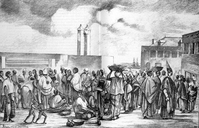 Place et marché de Gorée (illustration de Côte occidentale d'Afrique du Colonel Frey, planche en dble page après p. 195)